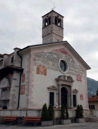 La chiesetta di Dasindo, Lomaso, Comano Terme, Giudicarie.